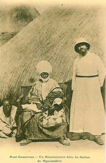 Missionnaire au Haut-Cameroun vers 1920.